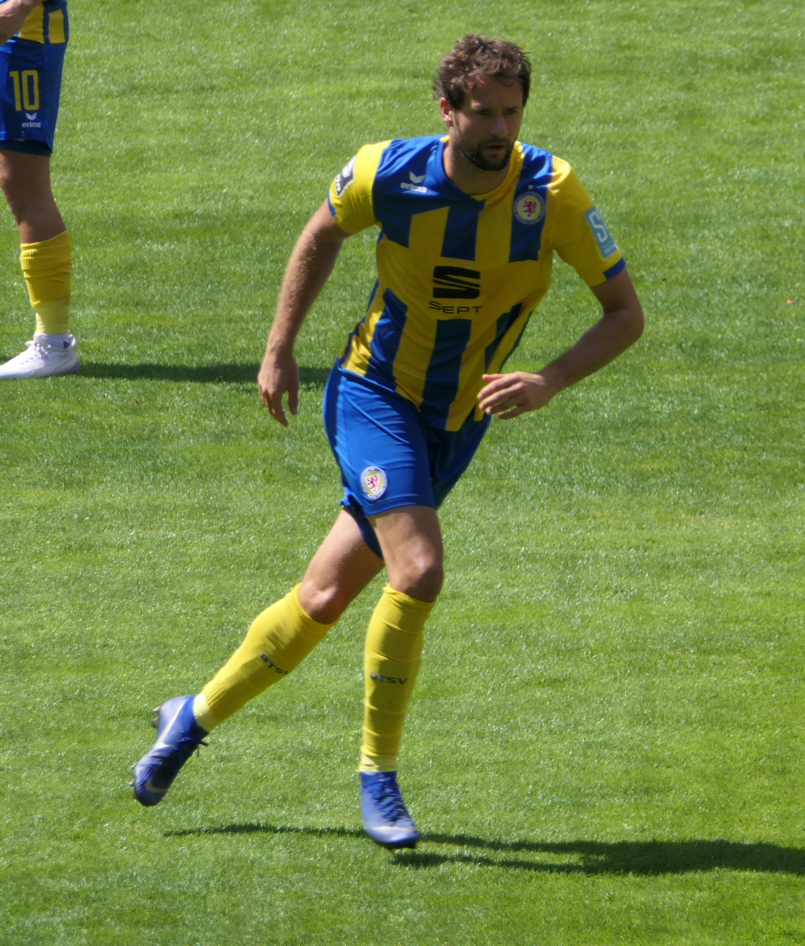 Der Fussballprofi Nick Proschwitz im Trikot von Eintracht Braunschweig beim Auswärtsspiel gegen den 1.FC Kaiserslautern am 18.08.2019.